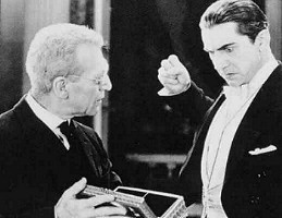 Screenshot da me realizzato dal trailer ufficiale del film Dracula, disponibile sul sito [1]